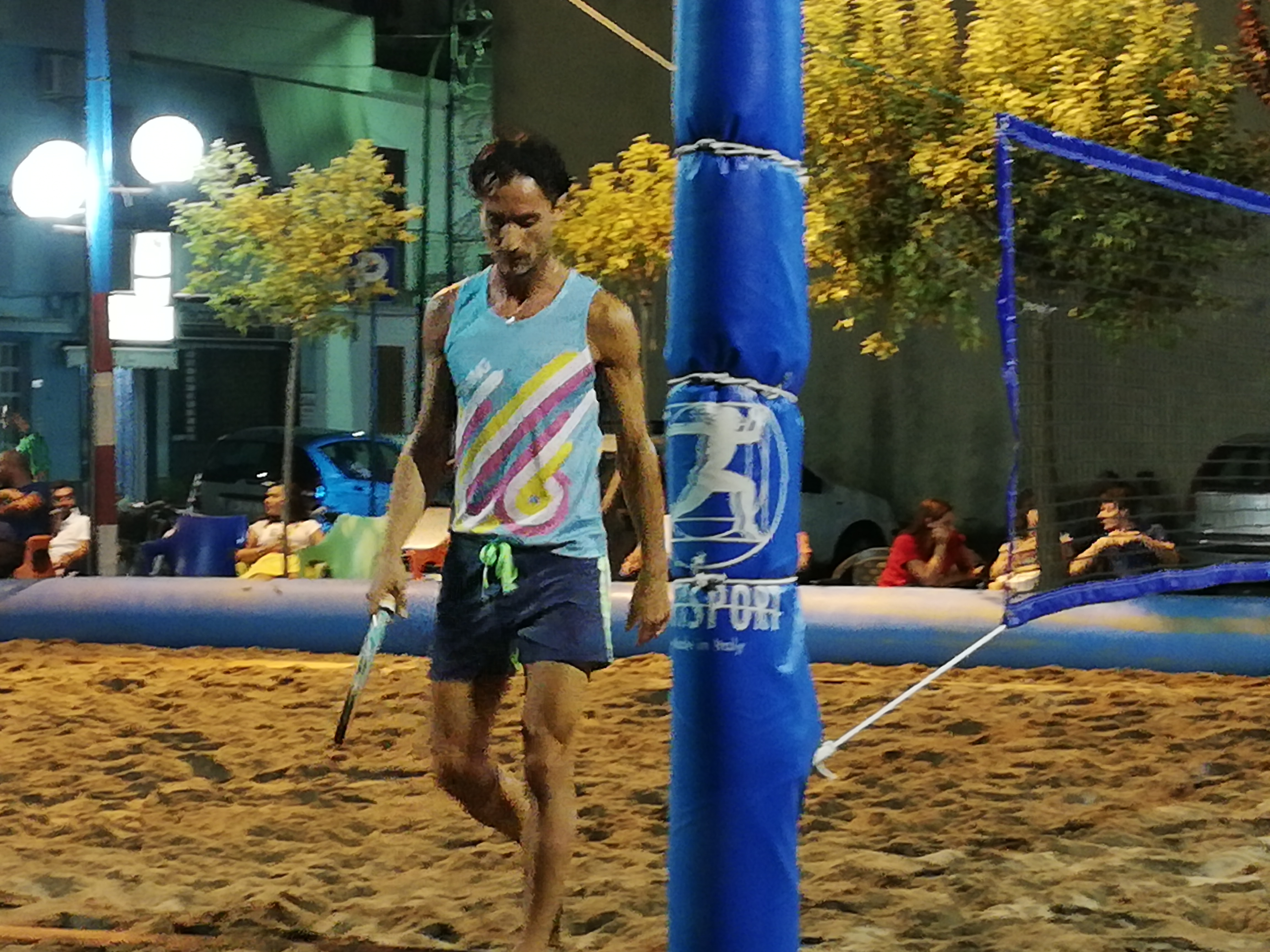 Dino Fava Passaro durante un momento di svago